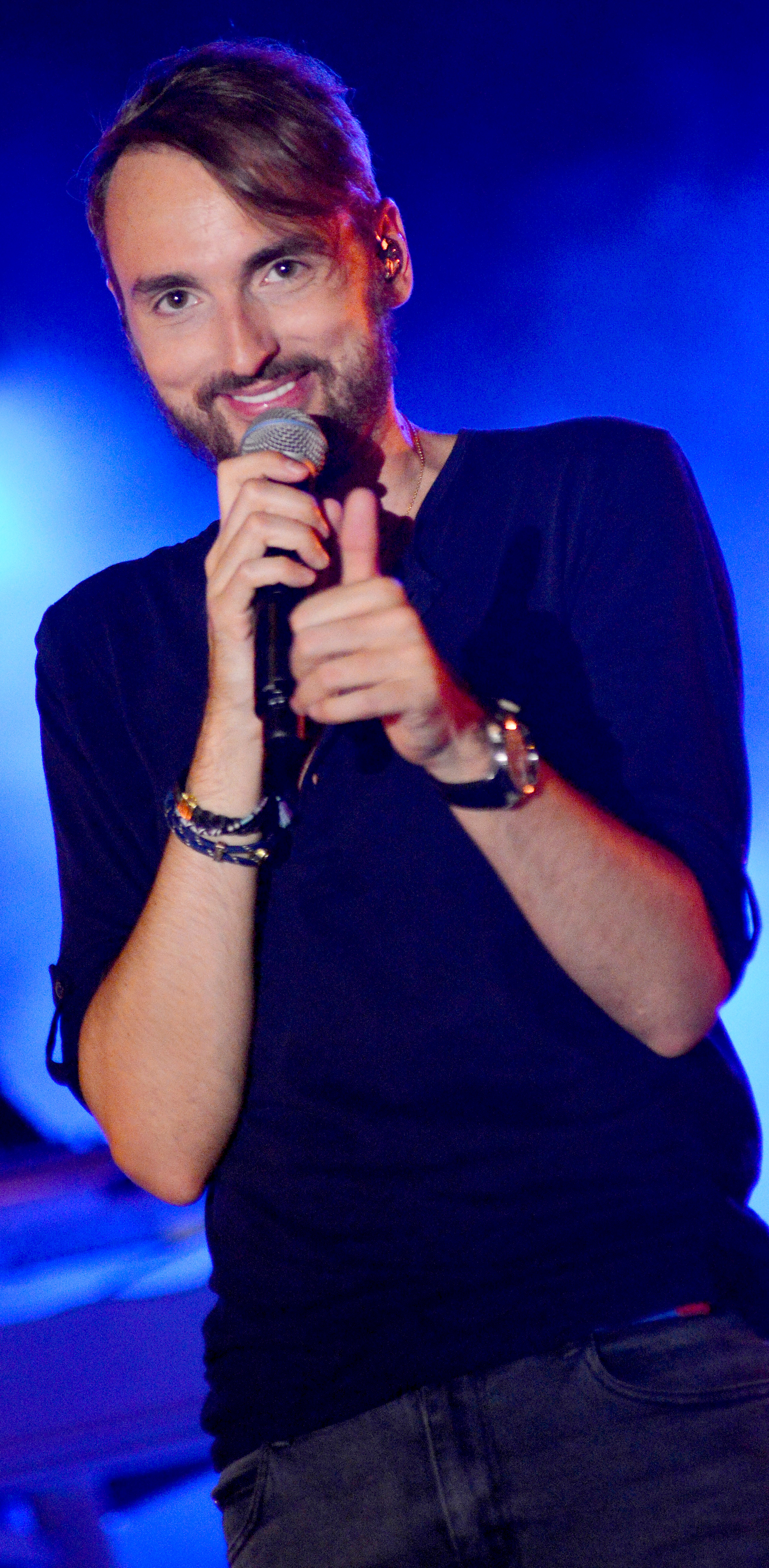 Christophe Willem en concert en 2015